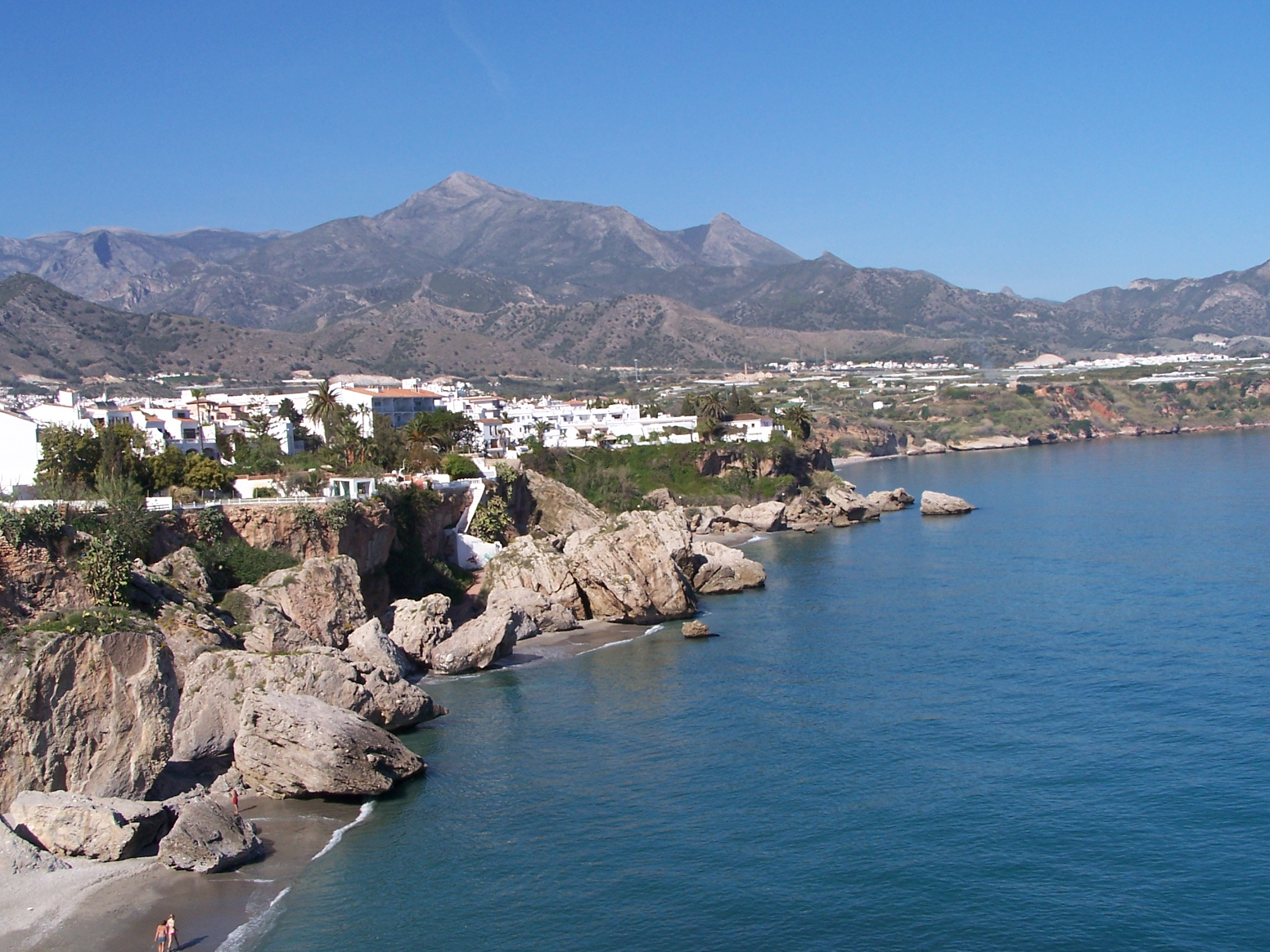 Vue depuis le balcon d'Europe